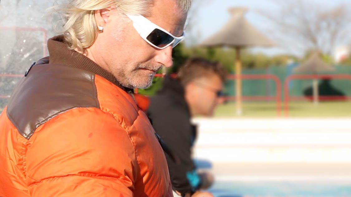 Image issue du film Les grands Buffets Vus par Philippe Lucas. Réalisé lors de ses entrainements à Narbonne.